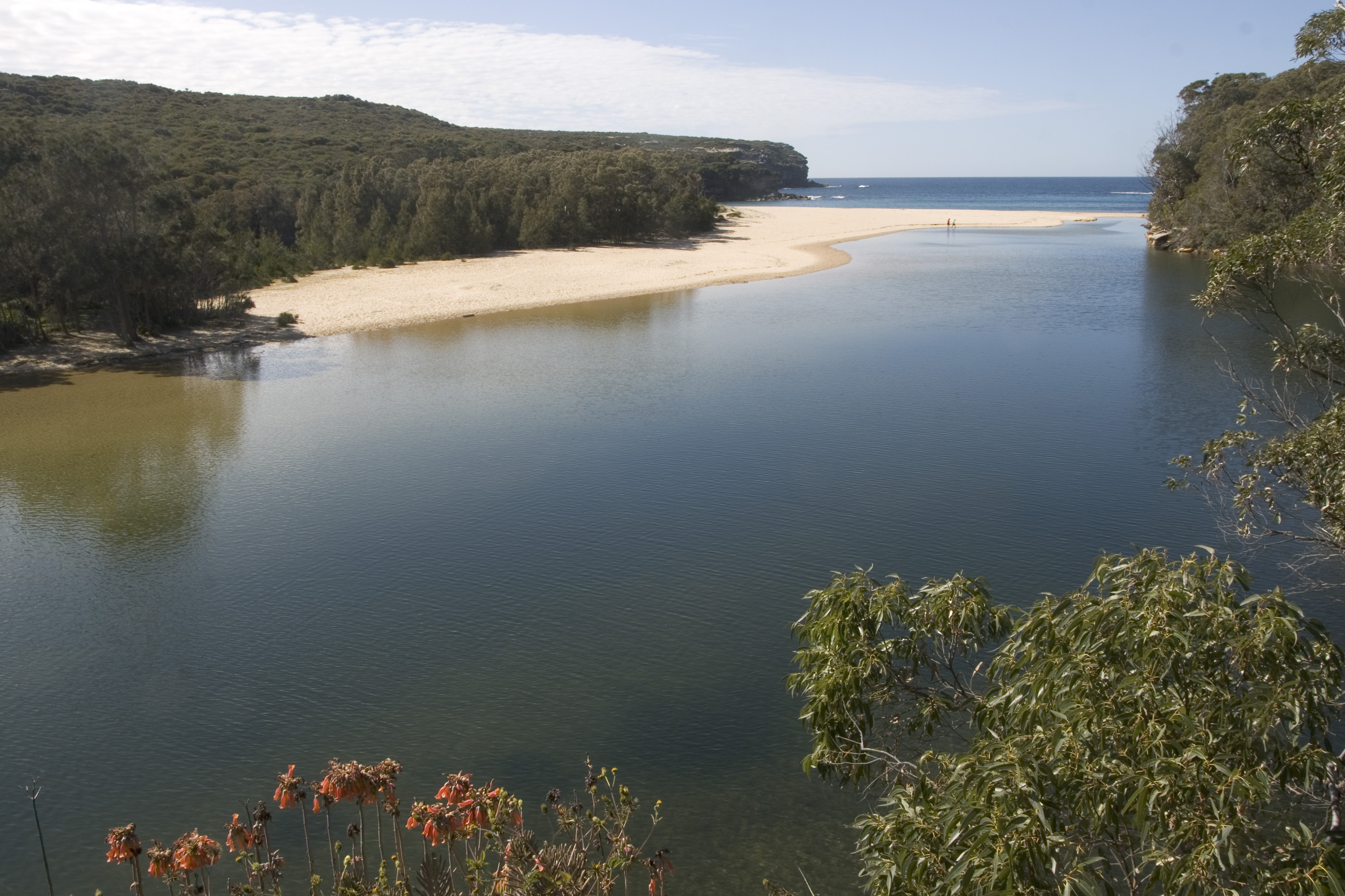 Wattamolla